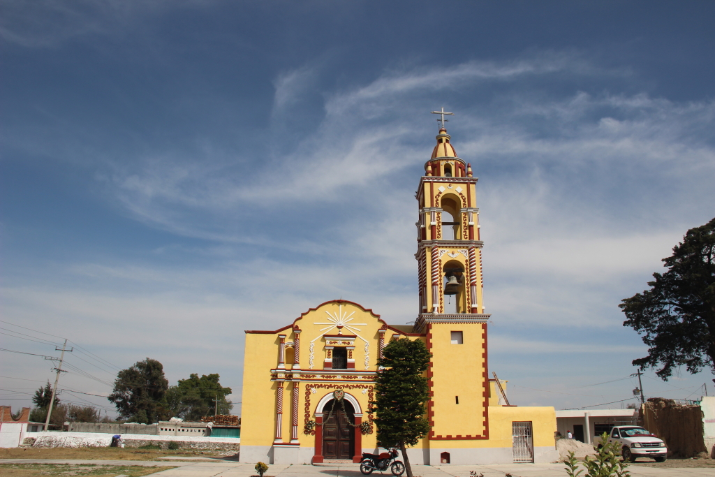 Templo de San Gregorio Aztatoacan, San Salvador el Verde, Estado de Puebla, México.